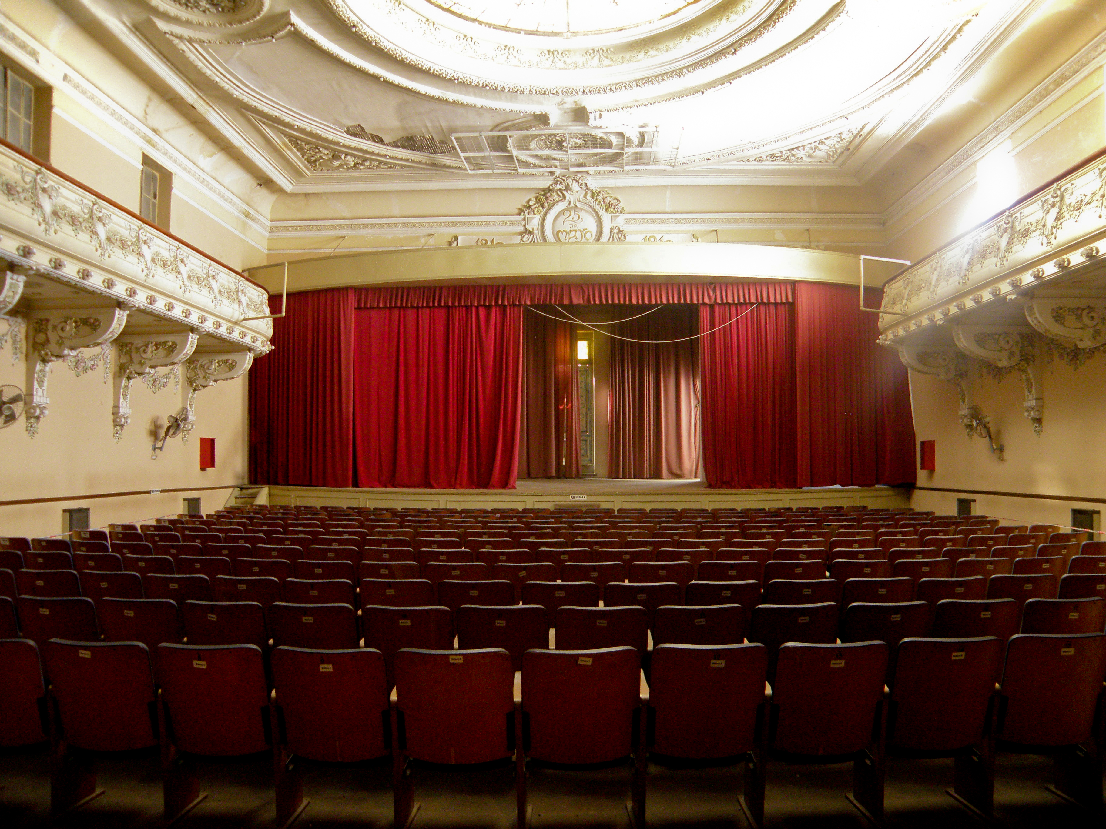 Biblioteca Popular del Paraná. Salon Principal planta alta, frente escenario.